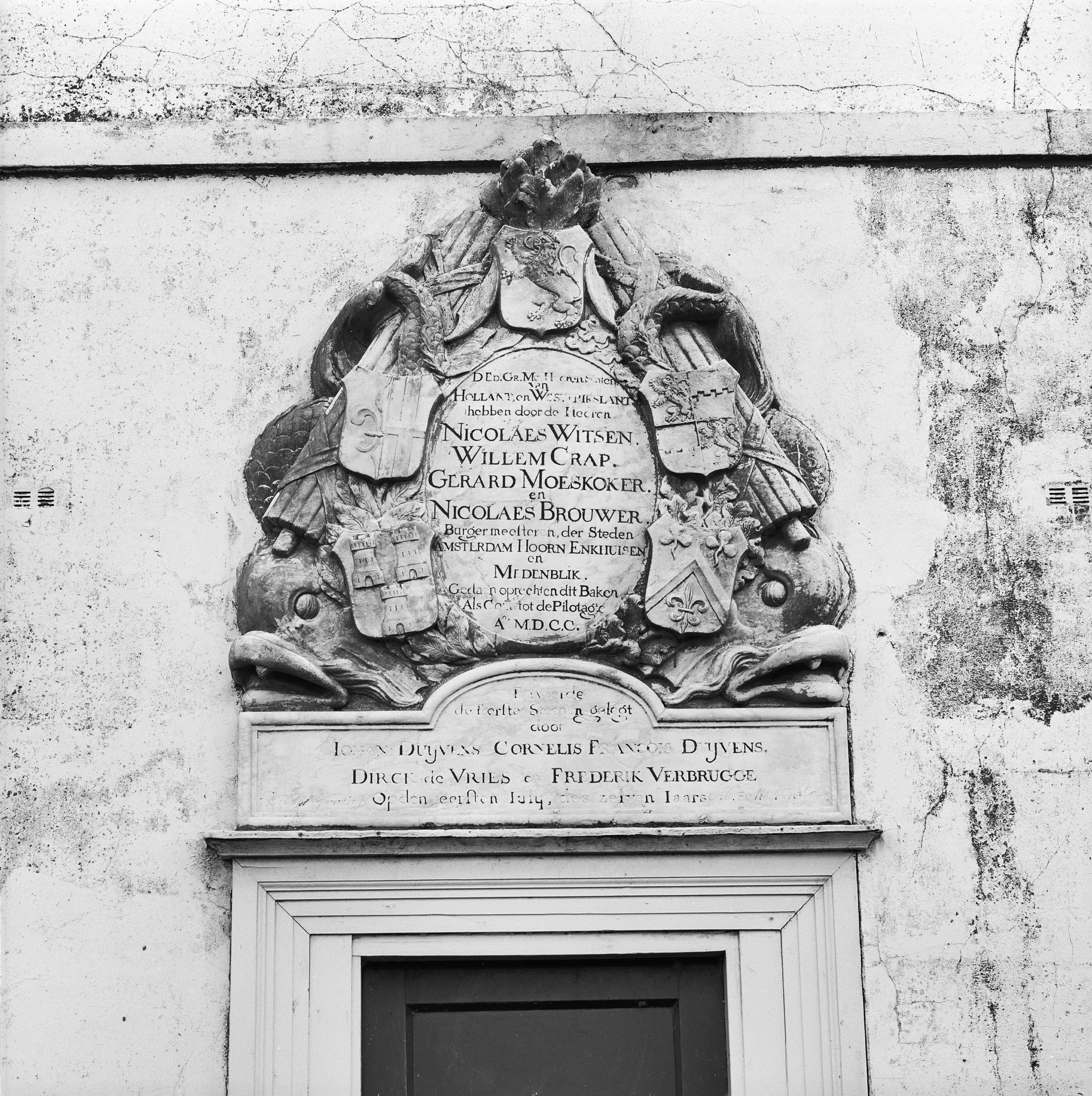 Vuurtoren "De Ven": steen boven ingang